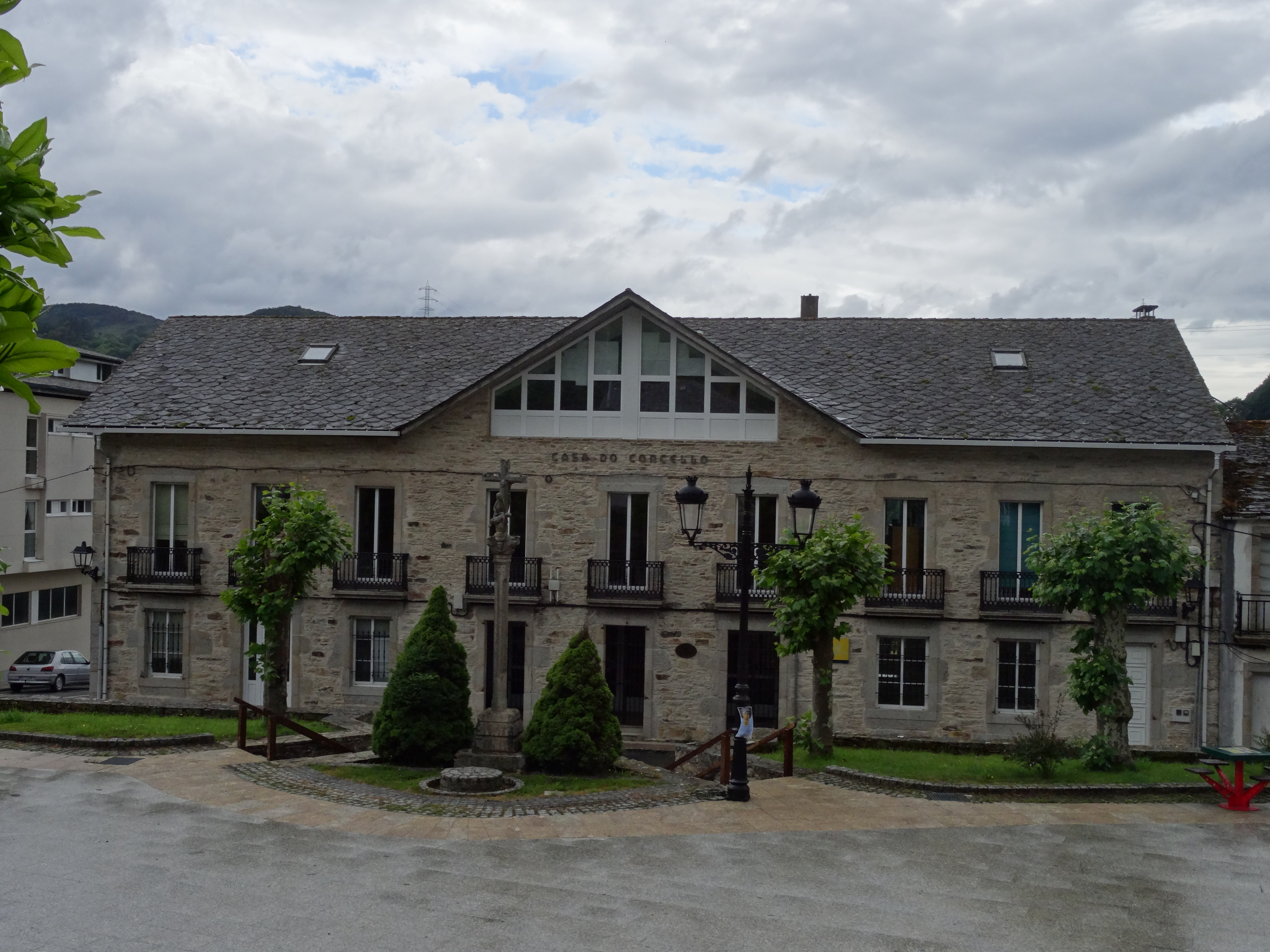 Ver título.